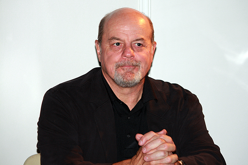 Michael Ironside auf der 6. Weekend of Horrors in Bottrop (NRW)